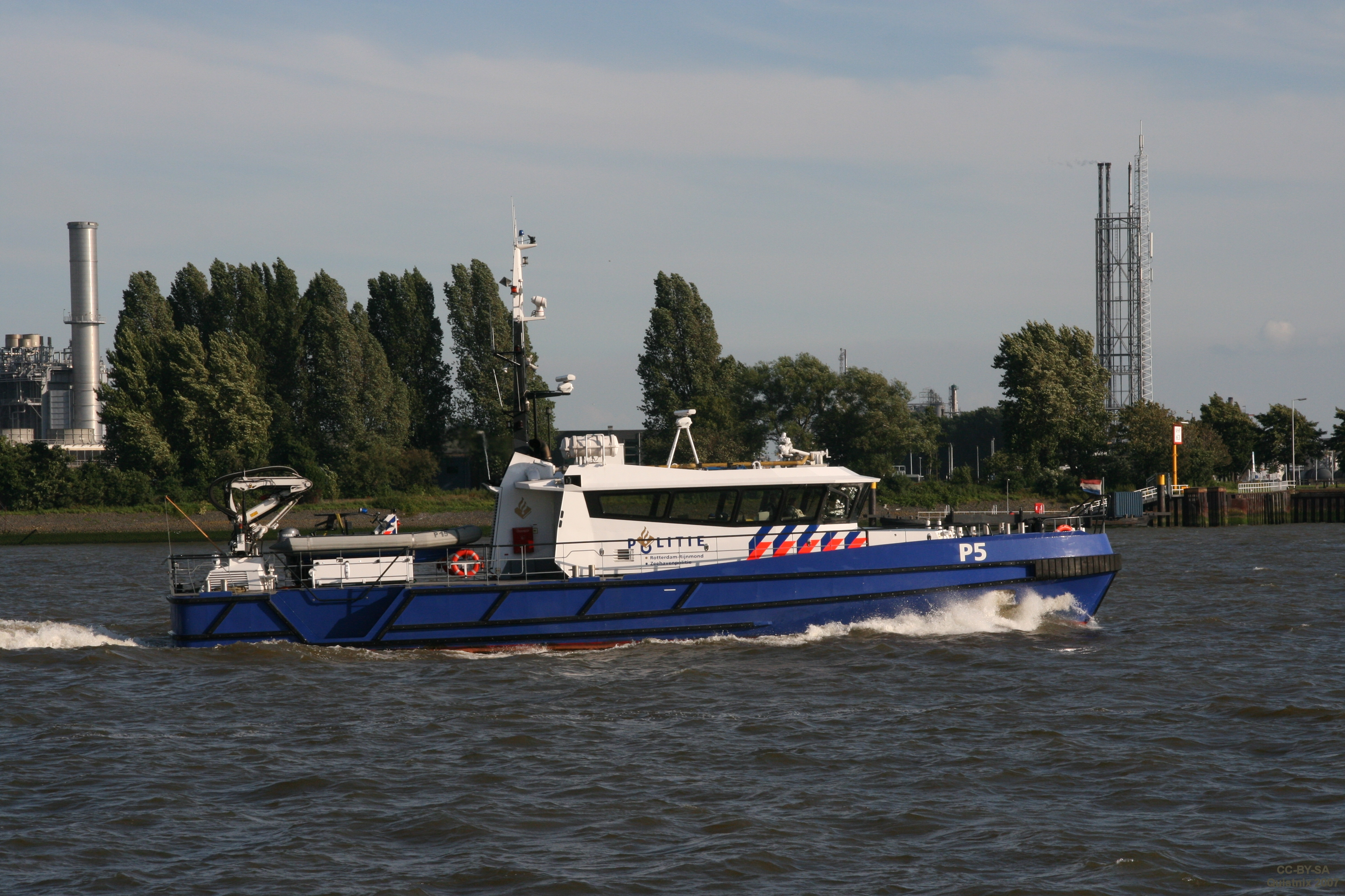 Politieboot P5 in de haven van Rotterdam